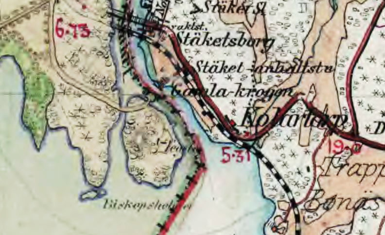 Stäket och Biskopsholmen (idag Stäketsholmen)